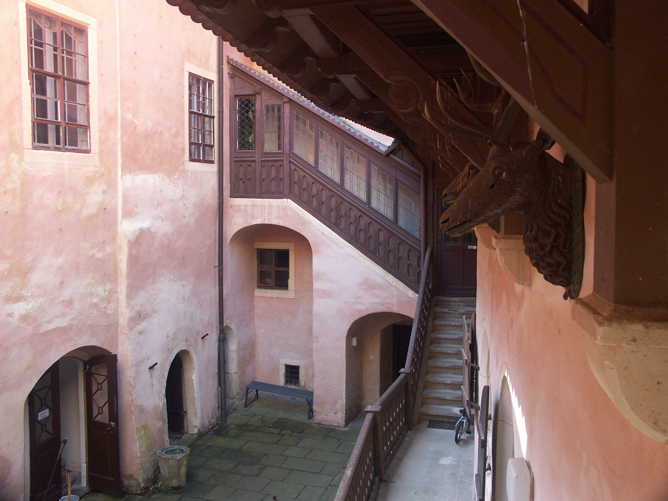 großer Innenhof von Schloss Kuckuckstein in Liebstadt